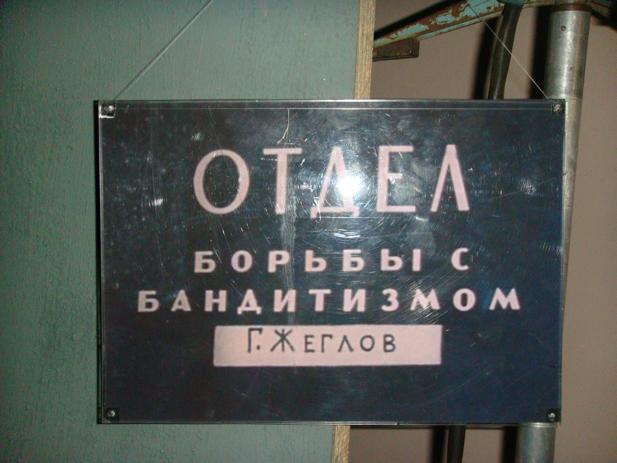 Одесский музей кино. Предметы быта на столе, записки, документы + камера и осветительная техника, которые принимали участие в съемках фильма "Место встречи изменить нельзя". Съёмочный павильон №5.